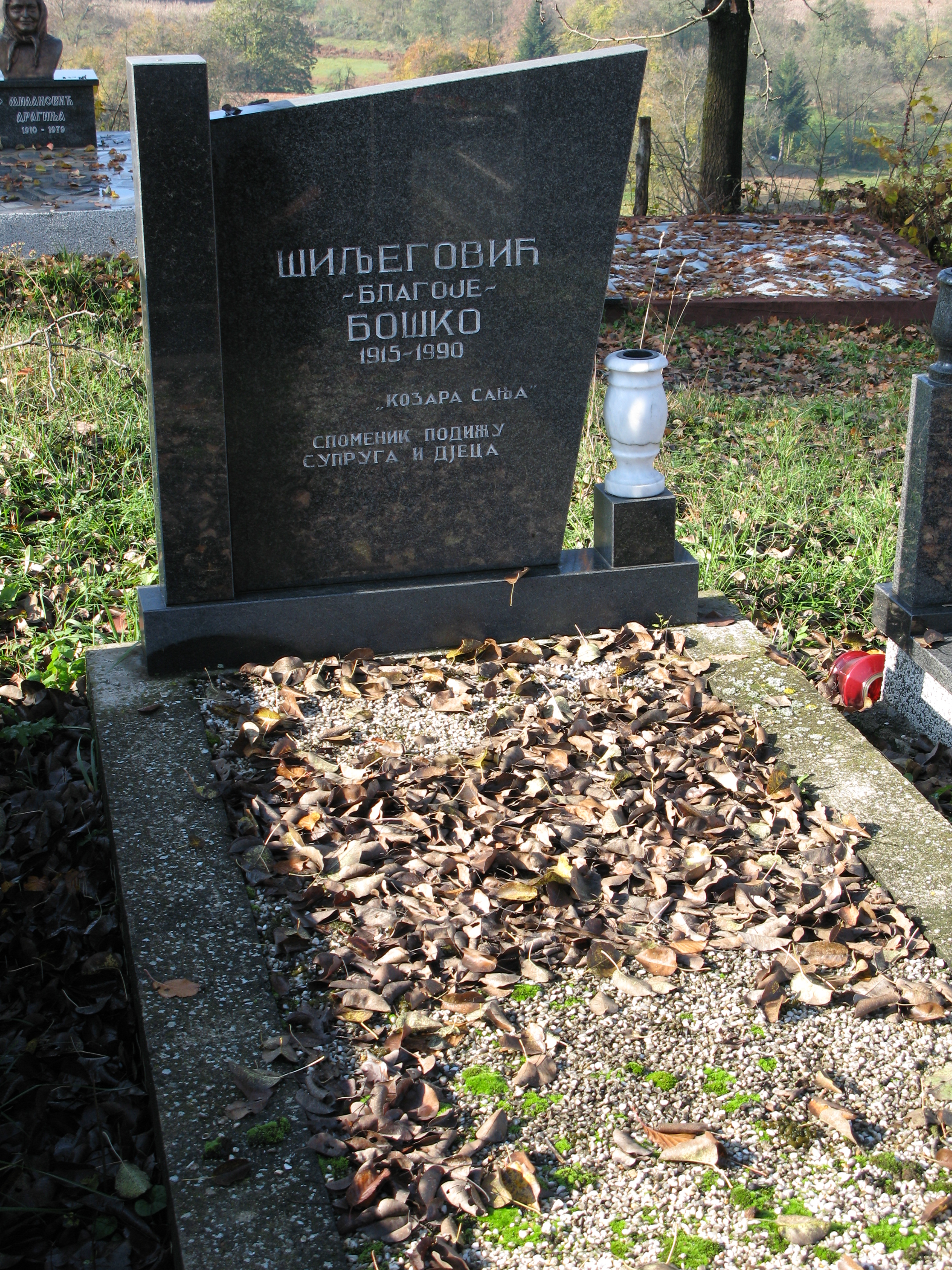 Гроб Бошка Шиљеговића.